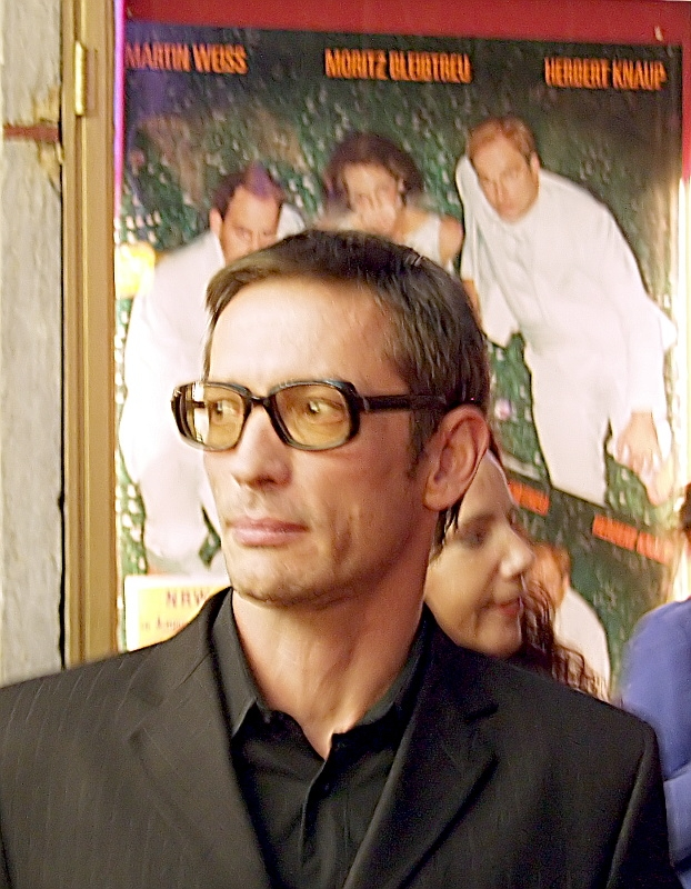 Oskar Roehler bei der NRW-Filmpremiere des Films Agnes und seine Brüder in der Lichtburg in Essen.